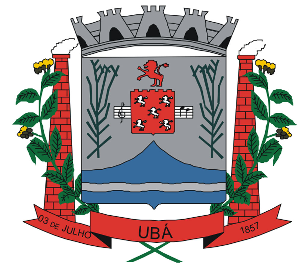 Brasão da Cidade de Ubá, Minas Gerais, Brasil